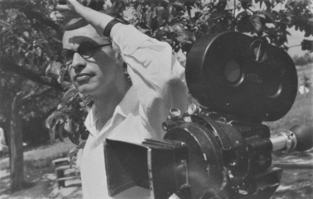 Natan Gross bei den Dreharbeiten zu dem jiddischsprachigen Film „Unzere kinder“ (Unsere Kinder) 1948 in Polen